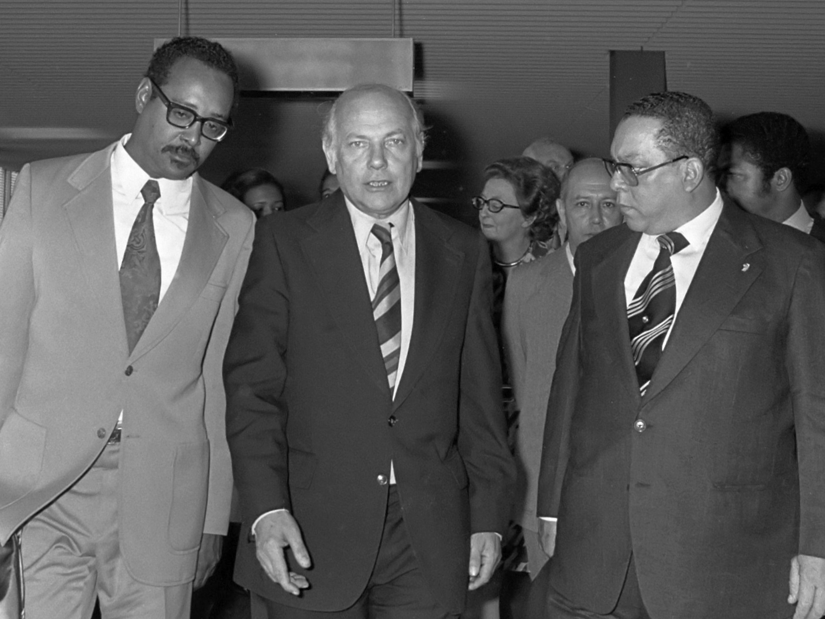 Premiers van Suriname en Nederlandse Antillen arriveren op Schiphol, v.l.n.r. premier Arron (Suriname), Den Uyl en premier Evertsz (Nederlandse Antillen) 15 mei 1974